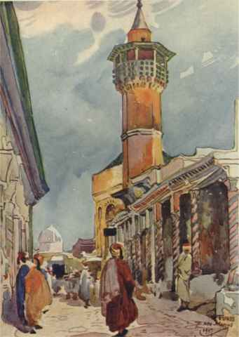 Représentation de la mosquée Youssef Dey à Tunis (Tunisie)